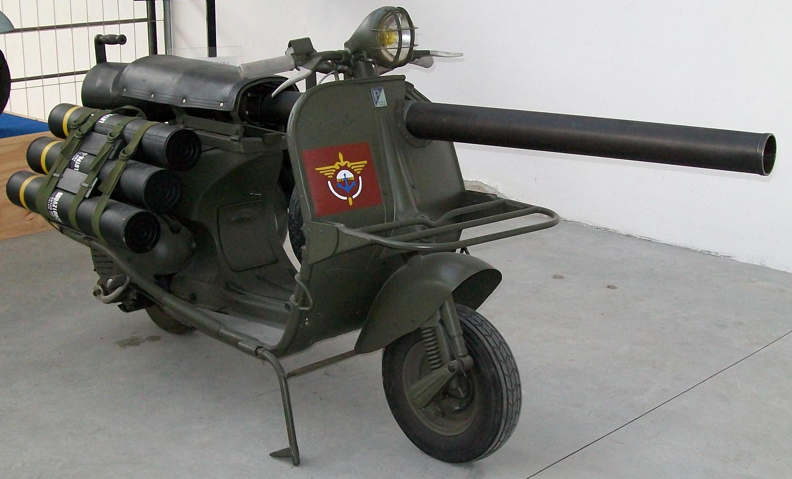 Vespa militare